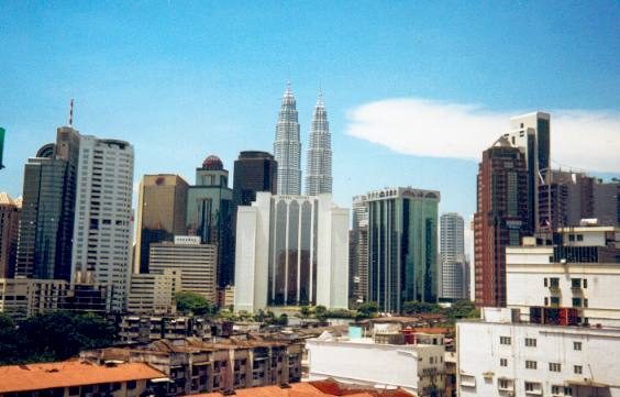 Innenstadt von Kuala Lumpur mit Petronas Towers